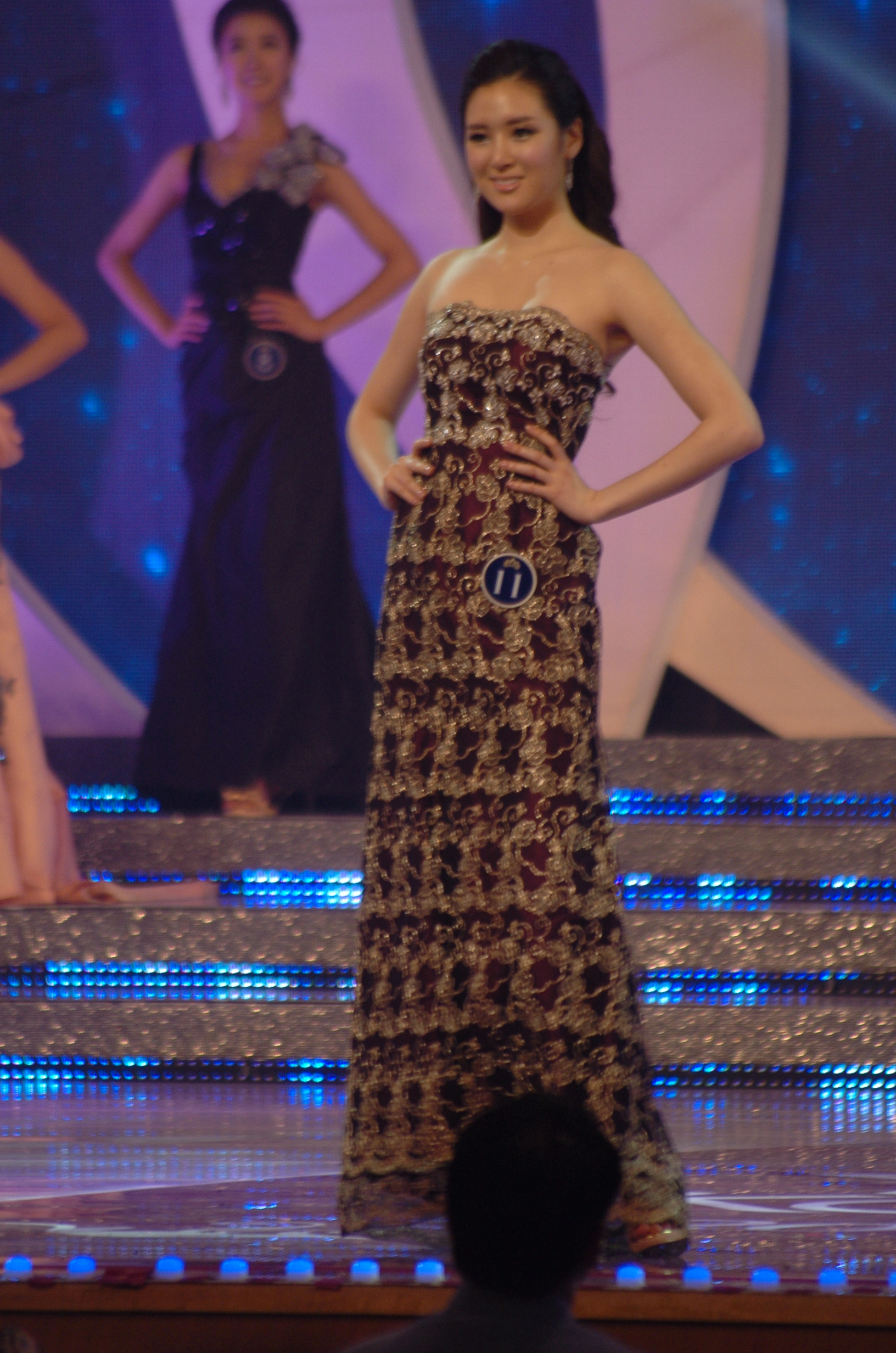 2012 미스코리아 서울 미 정유리 드레스 심사